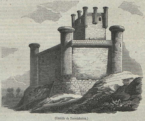 Castillo de Torrelobatón, grabado publicado en la revista española Semanario Pintoresco Español.